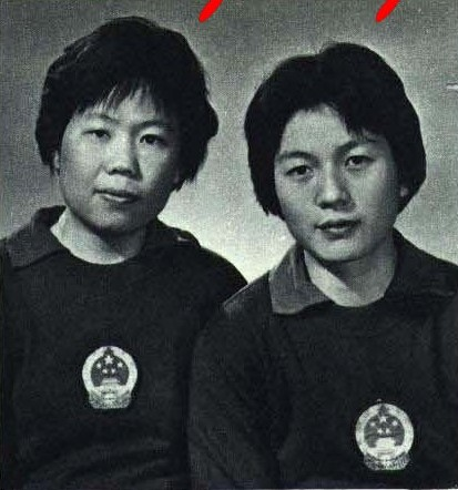 1965-7 1965年 28届世界锦标赛 林慧卿 郑敏之